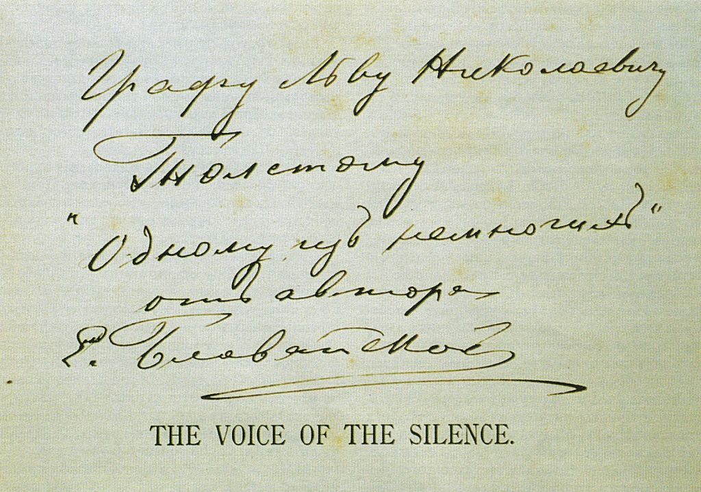 Дарственная надпись Е.П.Блаватской на книге "Голос Безмолвия", подаренной Л.Н.Толстому в 1889 году. Текст надписи: Графу Льву Николаевичу Толстому. "Одному из немногих" от автора Е. Блаватской